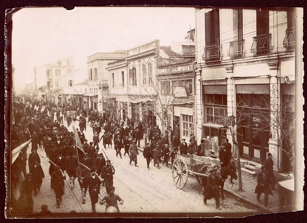 Влизането на Седма дивизия в Солун, 28 октомври 1912 г.